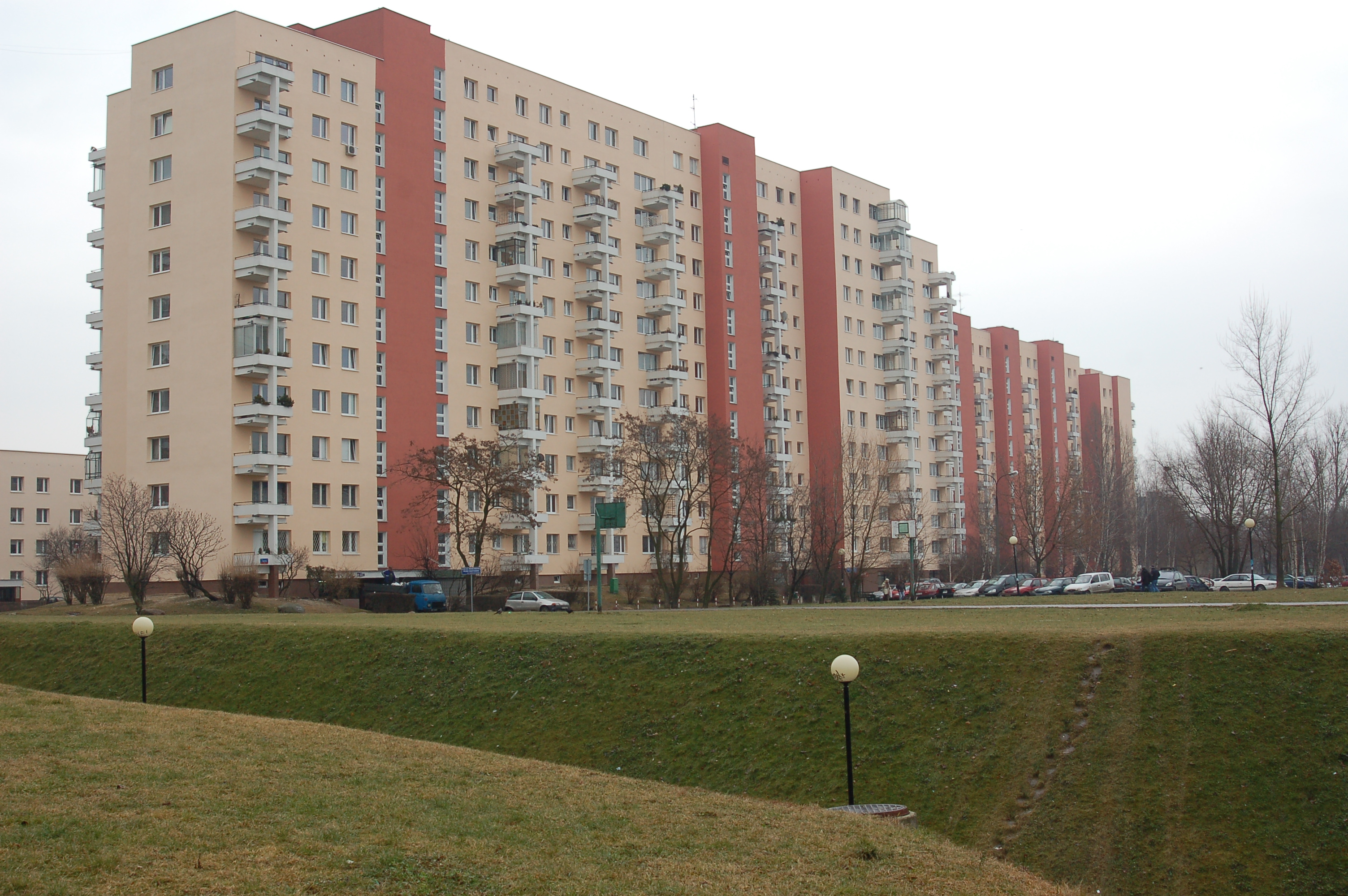 Budynek - ul. Sonaty